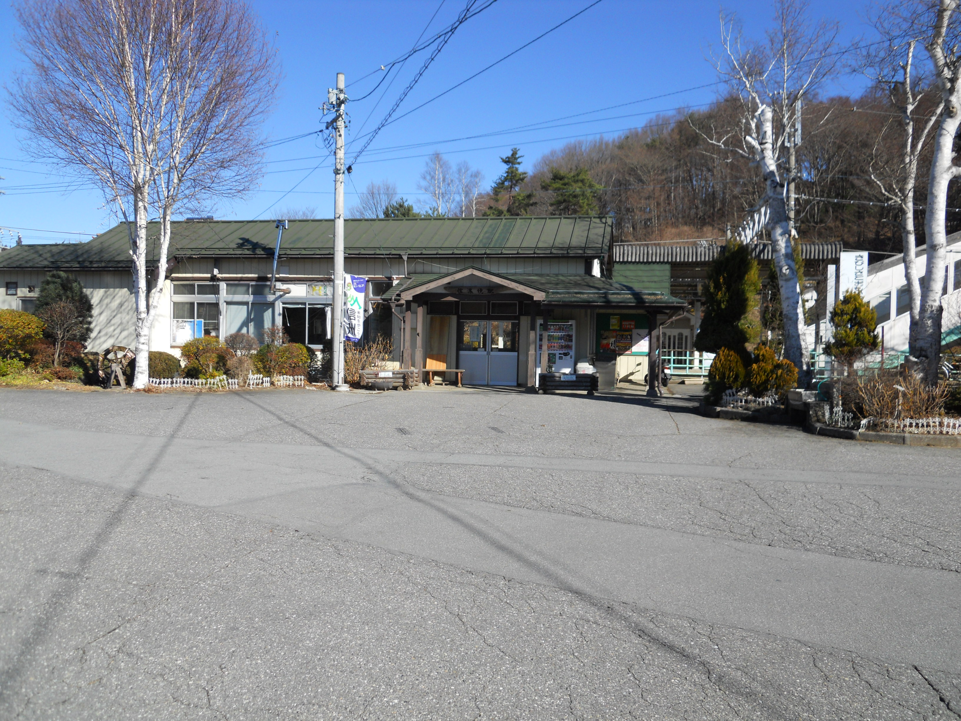 JR中央線信濃境駅